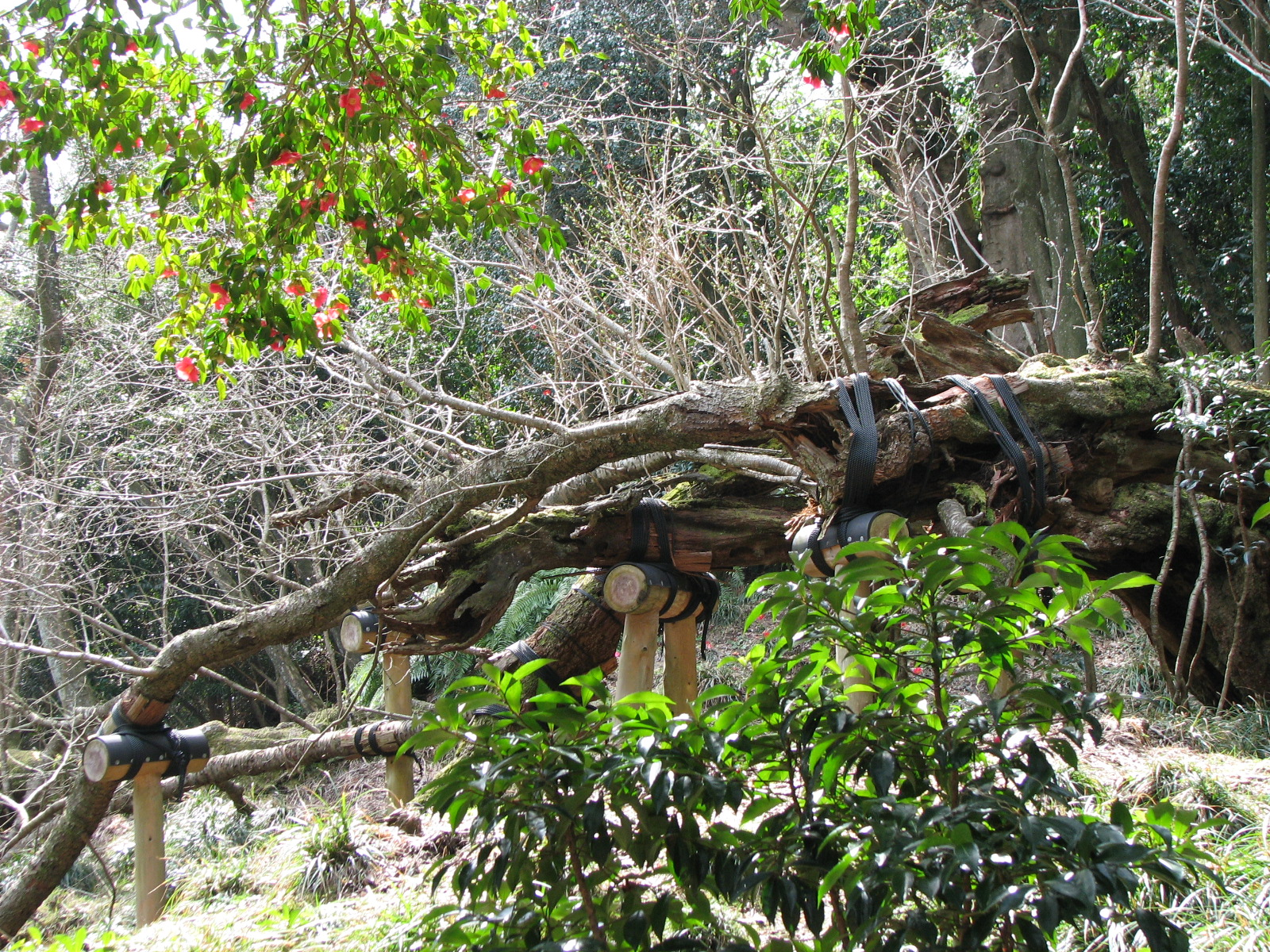 A stump of Oshima-zakura(Prunus speciosa):特別天然記念物・大島のサクラ株